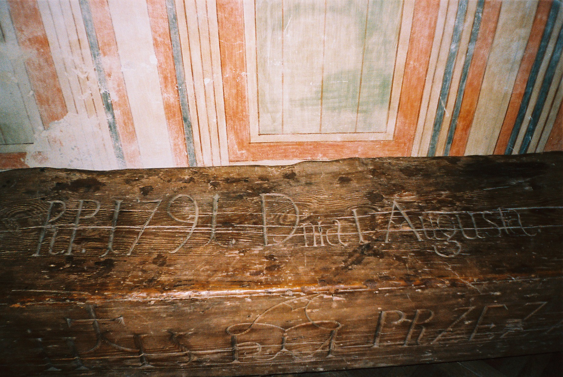 wnętrze kamienicy Gruszewiczów 4